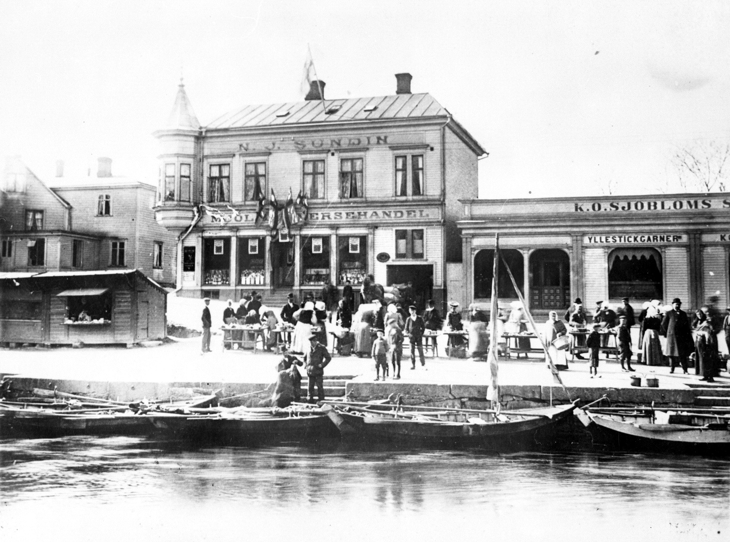 Ett äldre fotografi över Gamla Fisktorget i Ronneby taget 1912. Fisktorget ligger på den västra sidan av Ronnebyån och visar nu riven trähusbebyggelse.